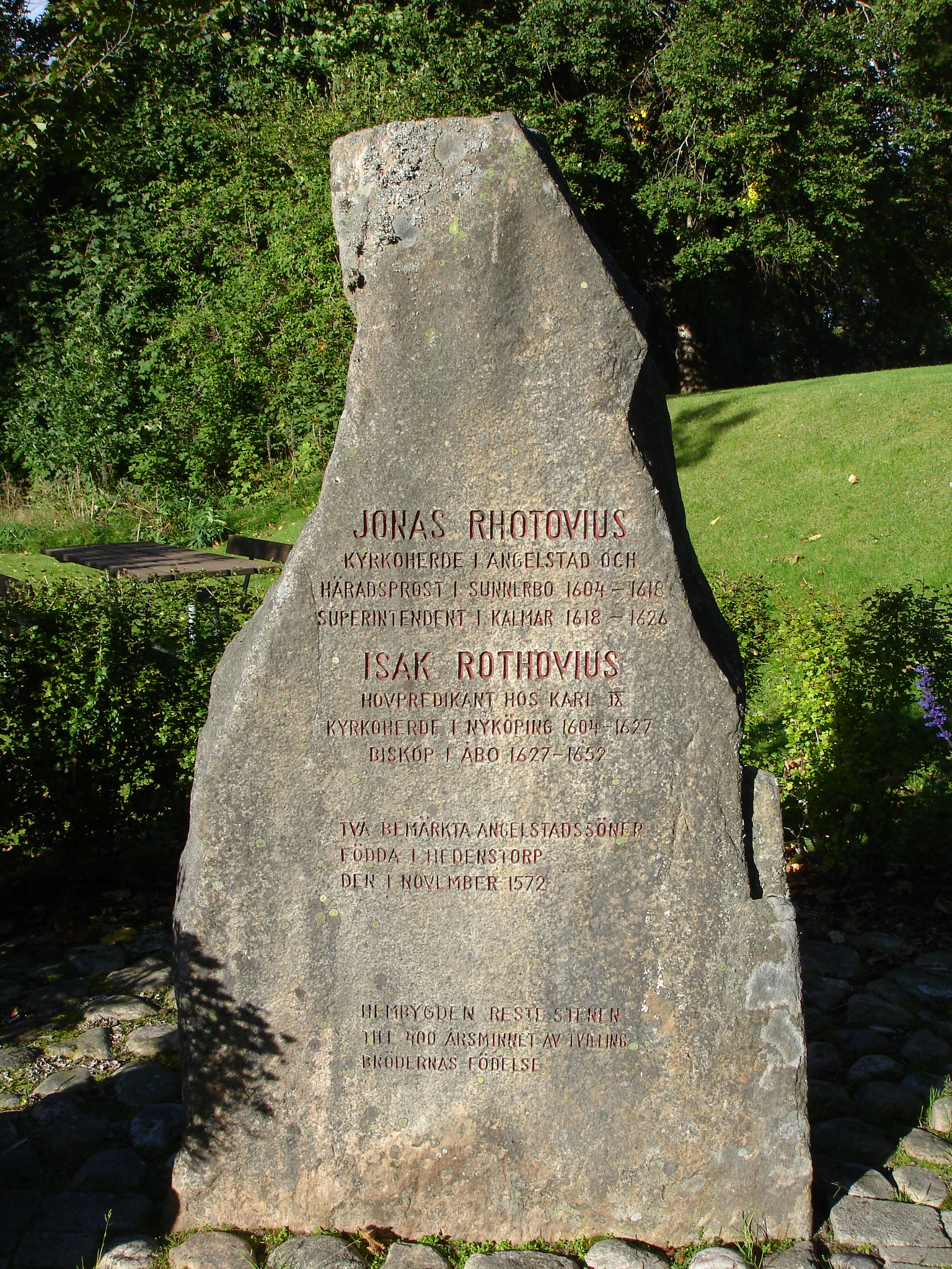 Minnessten Angelstad i Småland